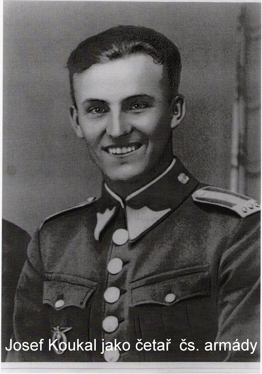 Josef Koukal v uniformě československé armády